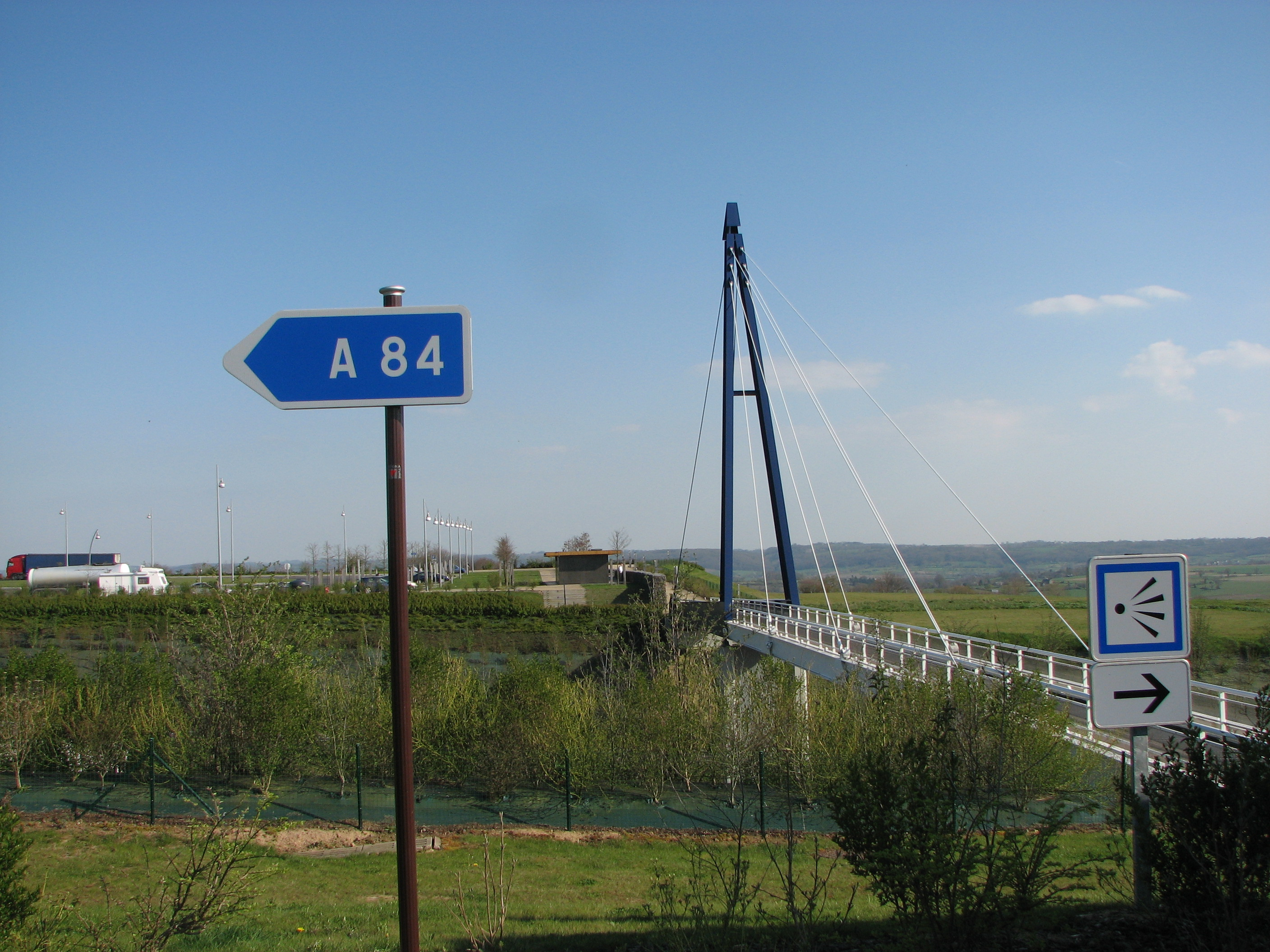 Passerelle au dessus de l'A84 à l'aire de la Baie, A84 au nord d'Avranches Footbridge over A84 motorway linking both side of rest area Aire de la Baie, north of Avranches, Normandy